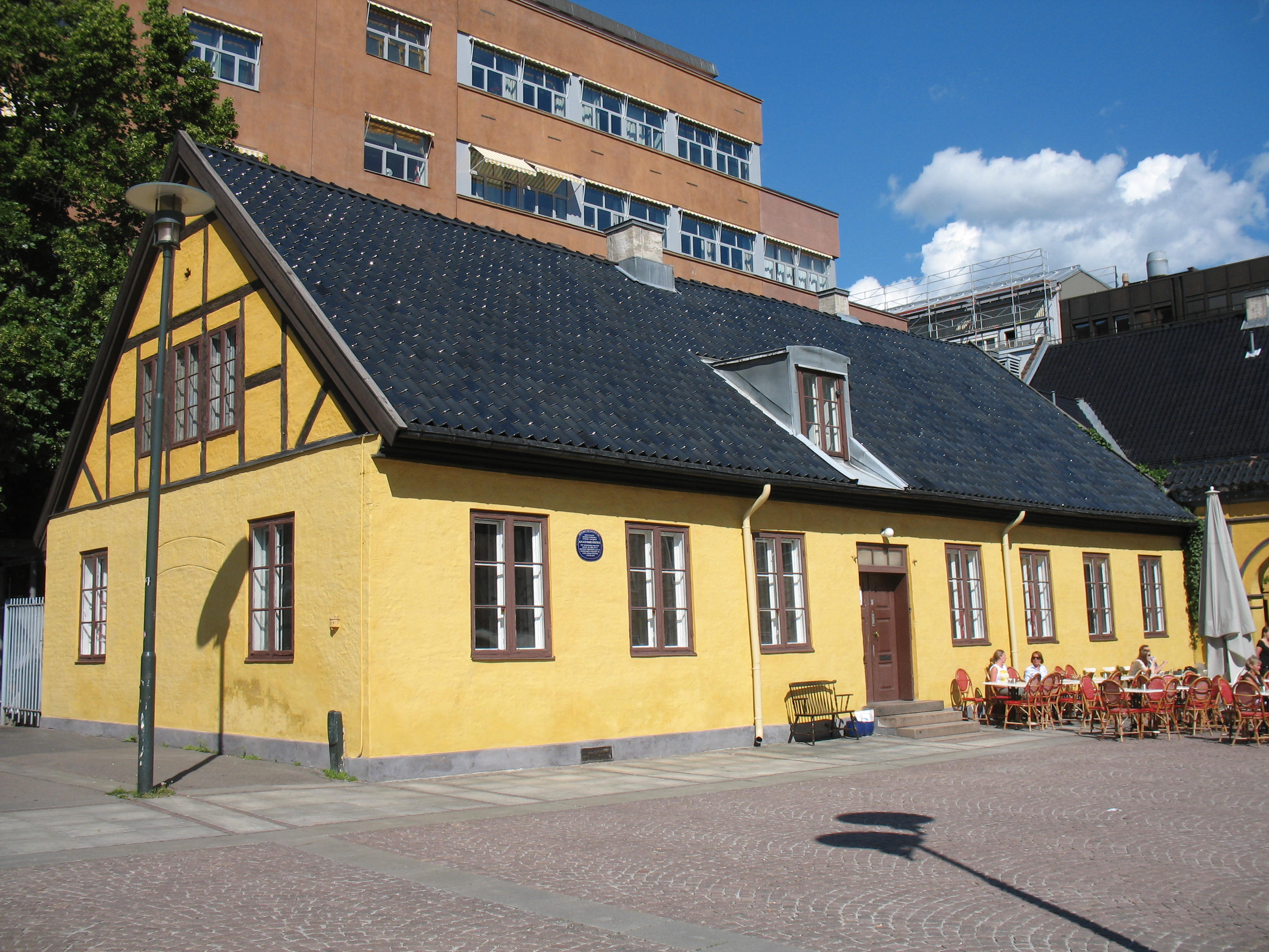 Anatomigården i Oslo